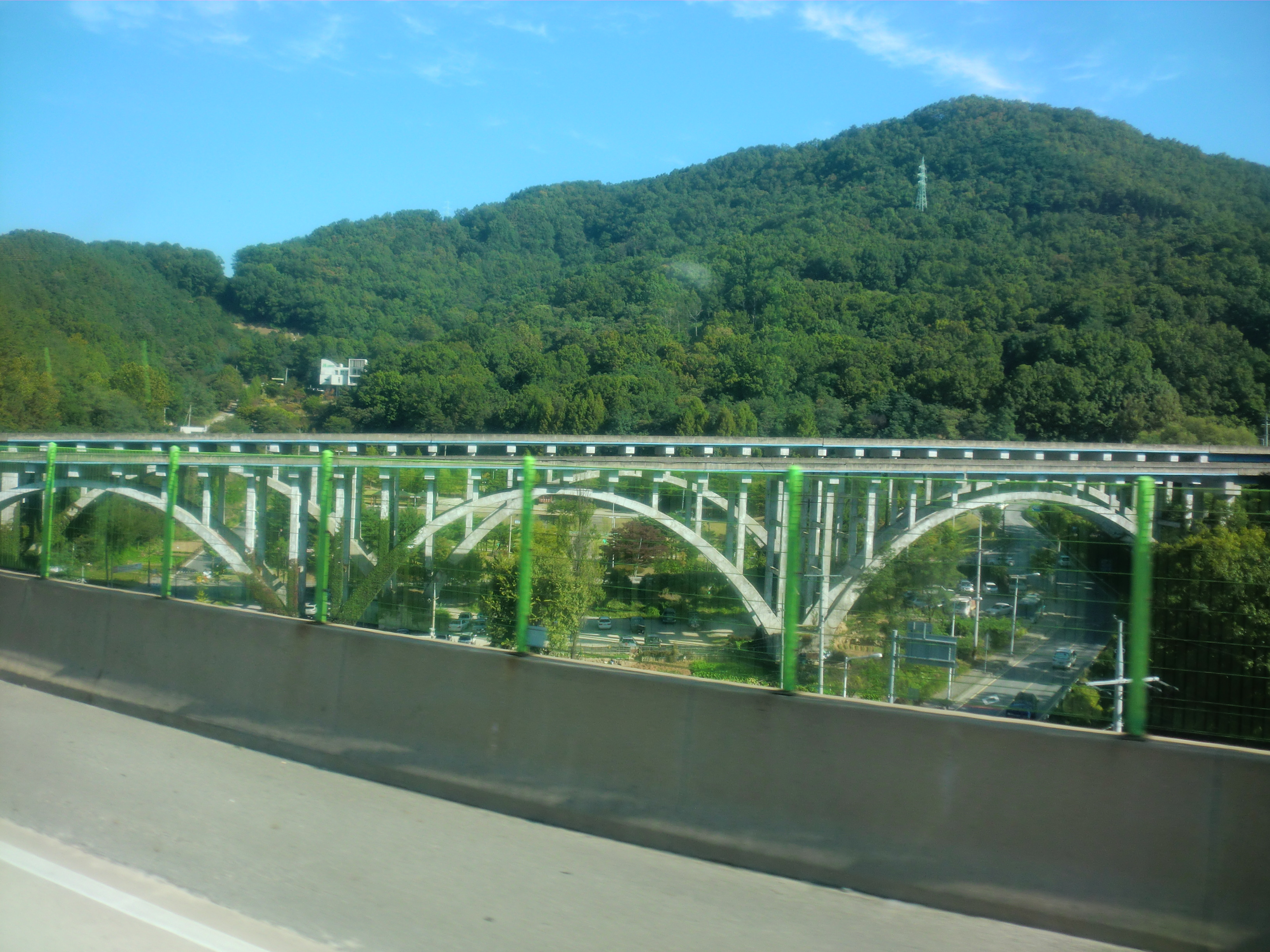 구 경부고속도로 대전육교